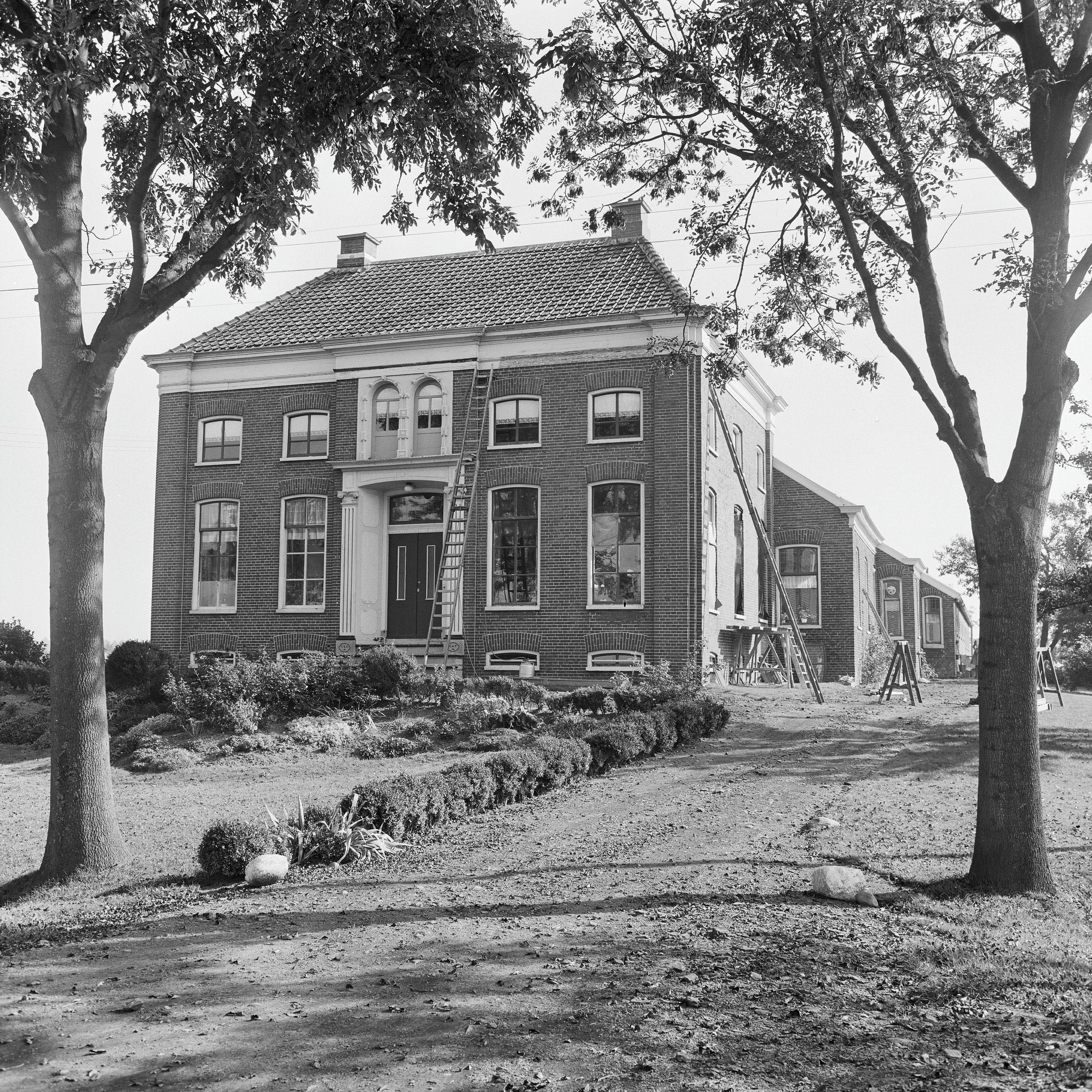 voorgevel